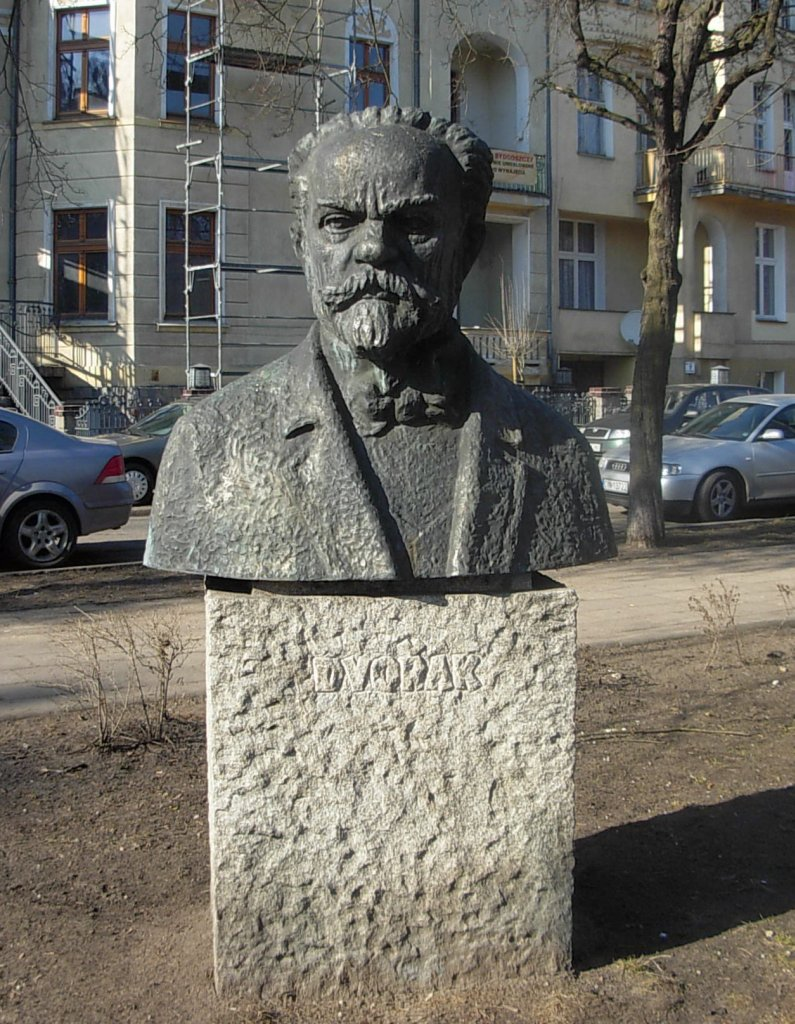 Galeria pomników kompozytorów i wirtuozów muzyki poważnej w Bydgoszczy - popiersie Antonina Dworzaka